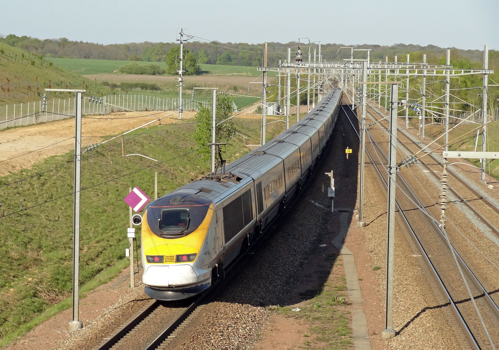 Une rame TMST quitte la LGV Interconnexion Est (triangle de Vémars) pour s'engager sur la LGV Nord en direction de Lille, à Moussy-le-Neuf (Seine-et-Marne), France.